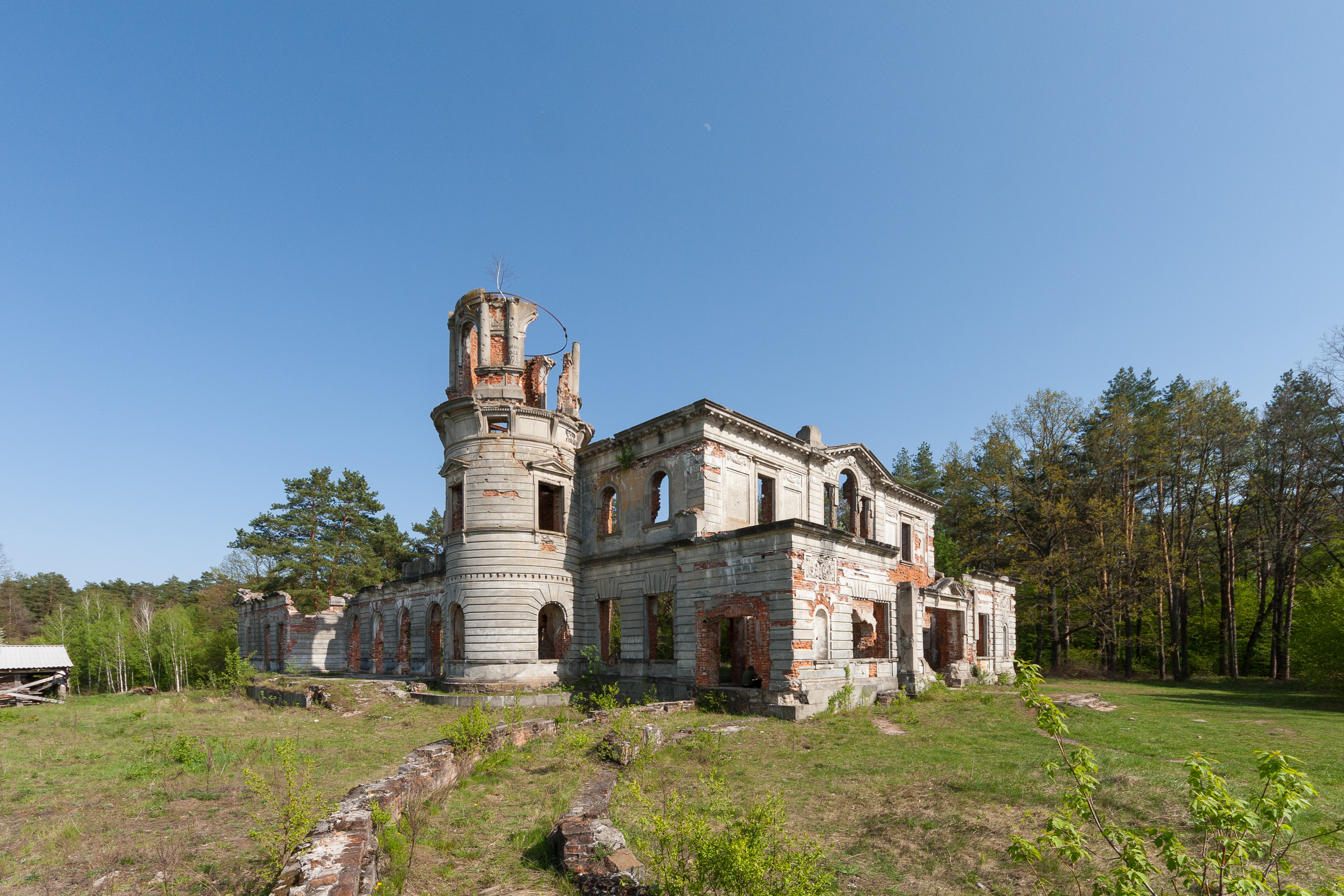 Замок Терещенка